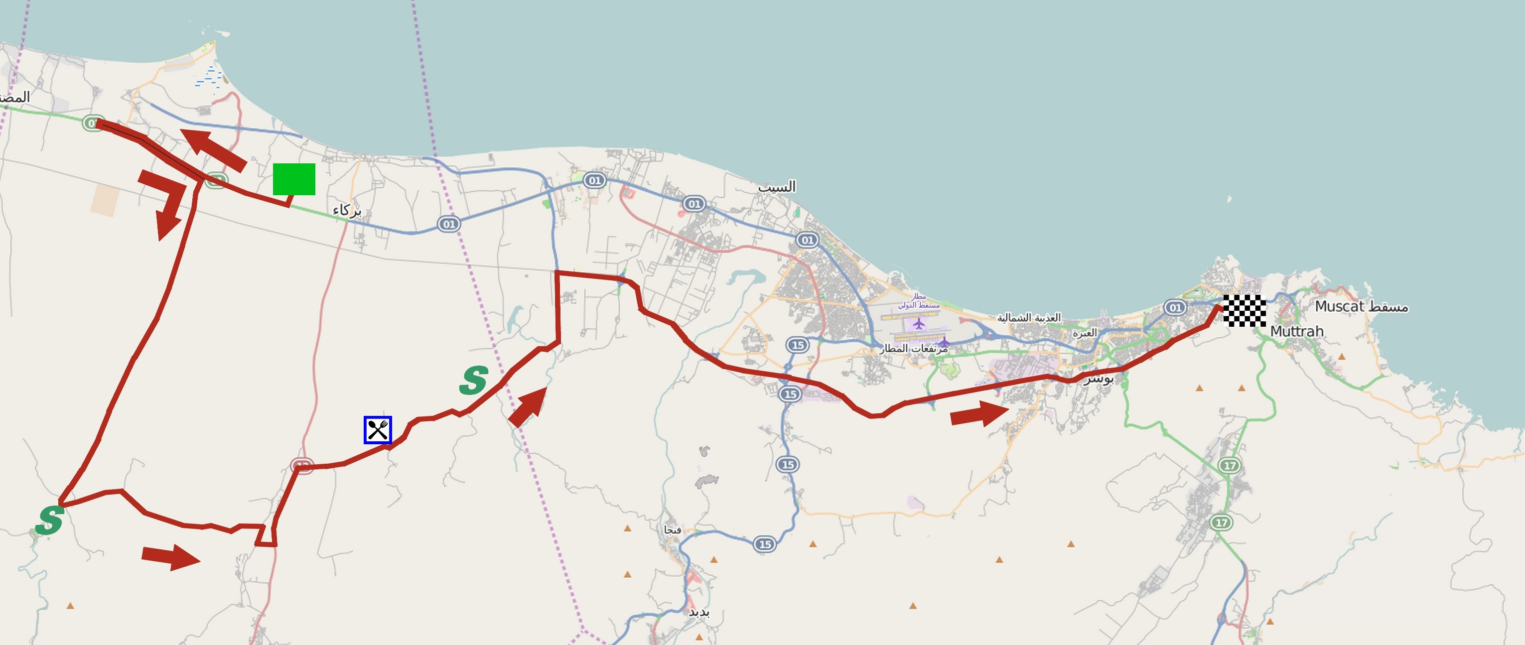 Parcours de la première étape du Tour d'Oman 2015. This map may be incomplete, and may contain errors. Don't rely solely on it for navigation.